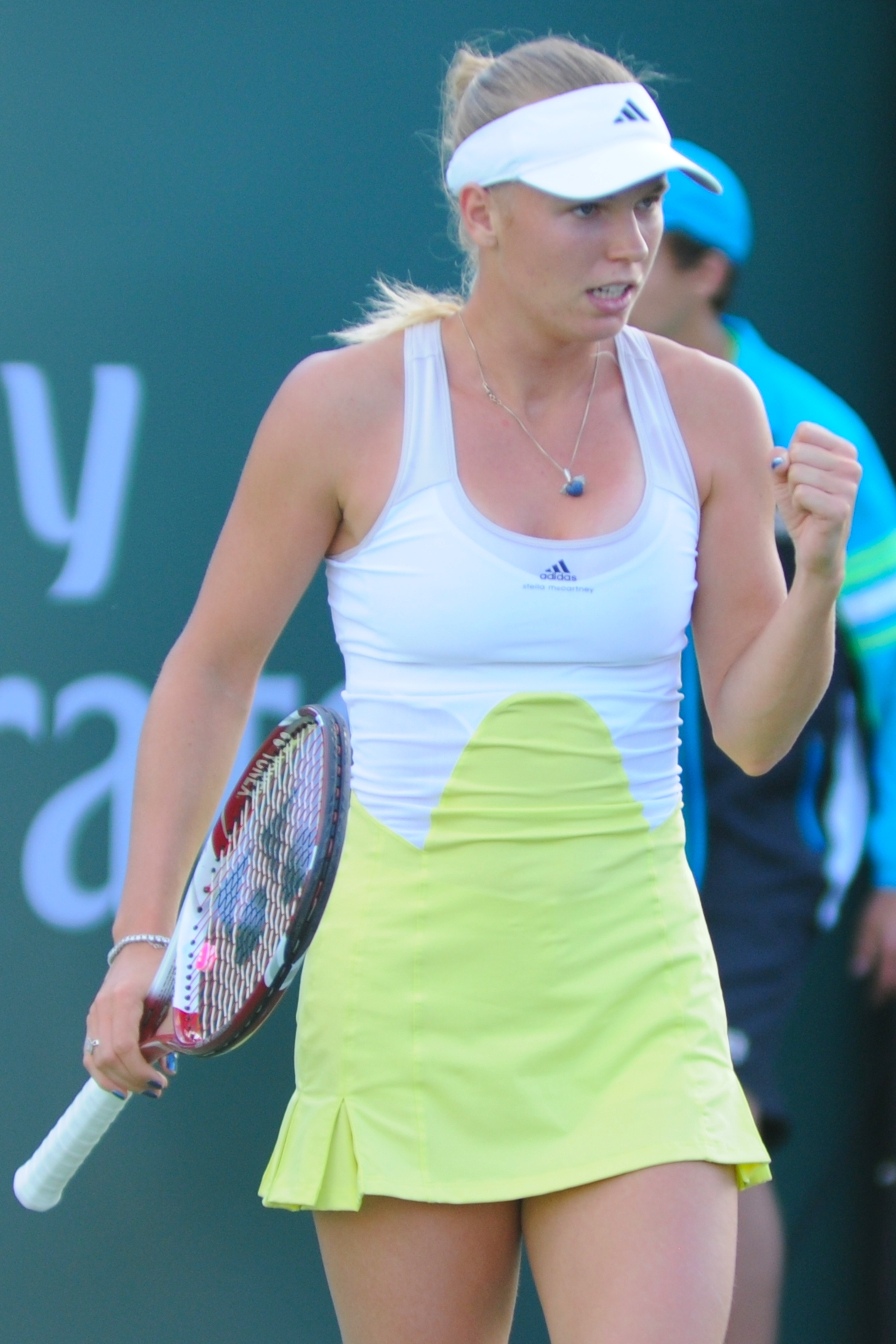 2013 BNP Paribas Open